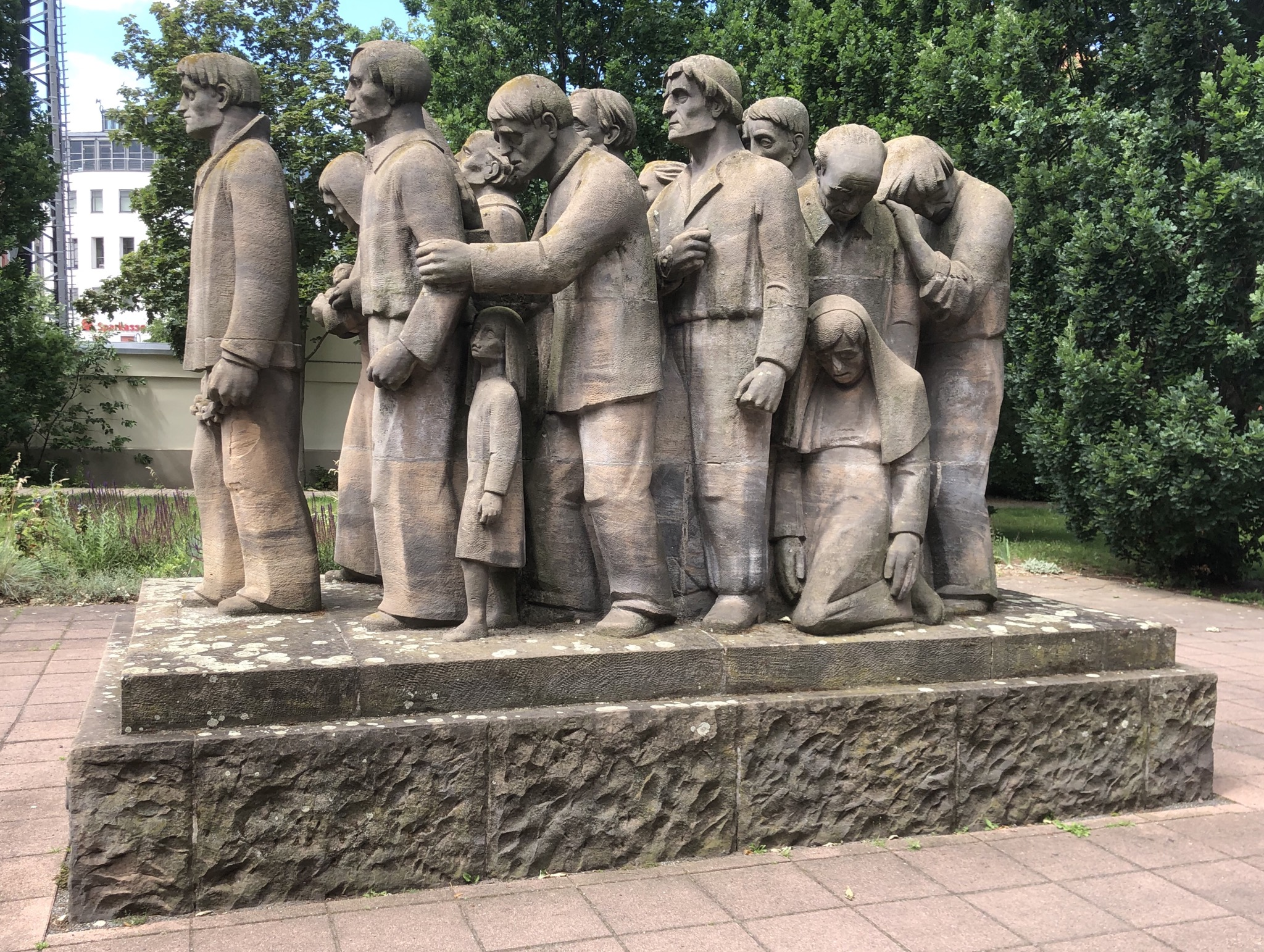 Mahnmal Weg in den Tod Schönebeck